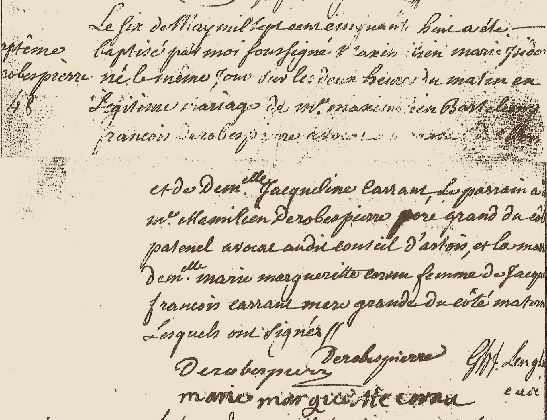 Acte de baptême de Maximilien de Robespierre le 6 mai 1758, paroisse de Sainte-Marie-Madeleine à Arras (Pas-de-Calais, France). L'acte original du baptême est sur deux pages.